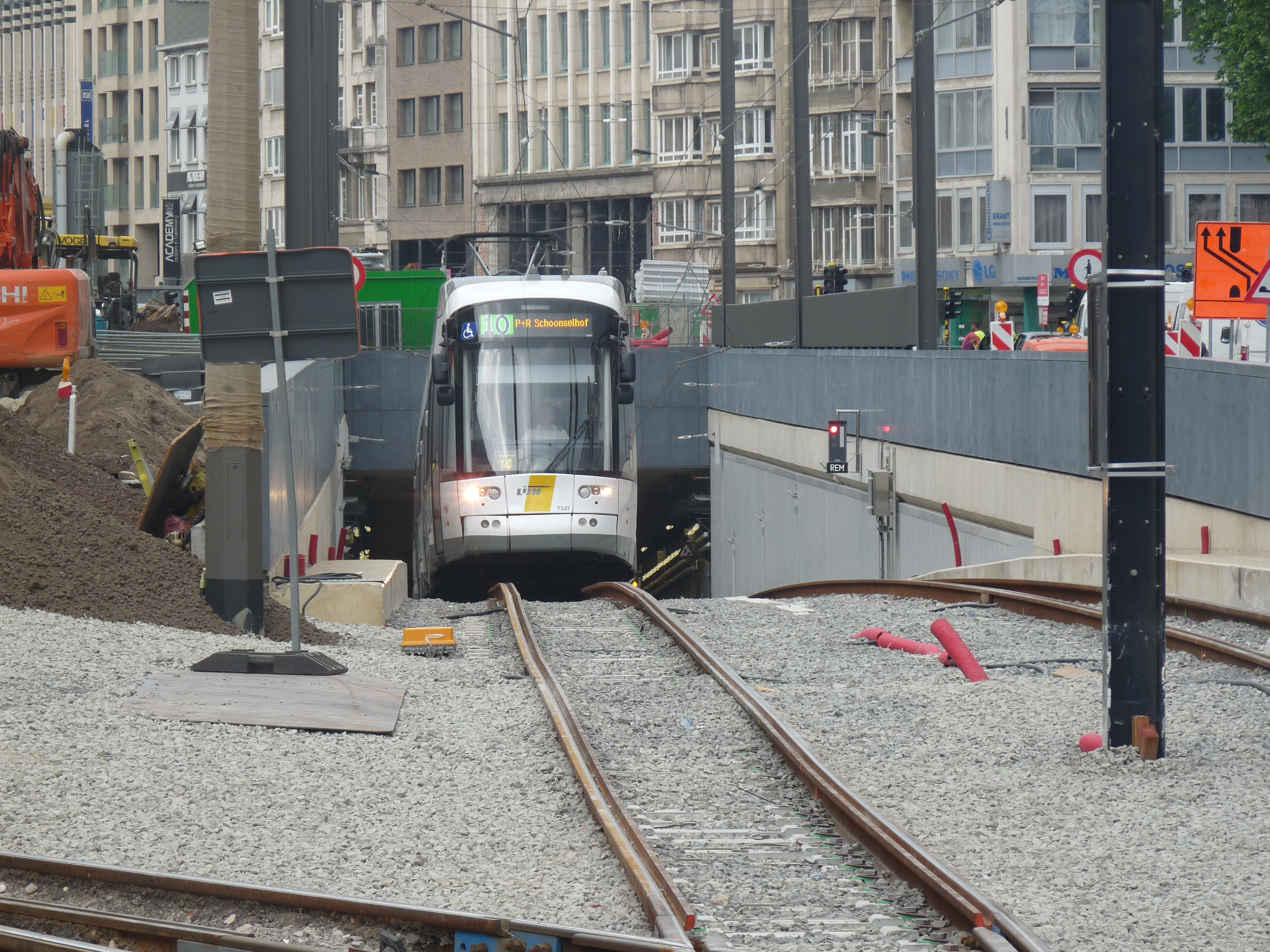 De tramhelling bij halte Stadspark